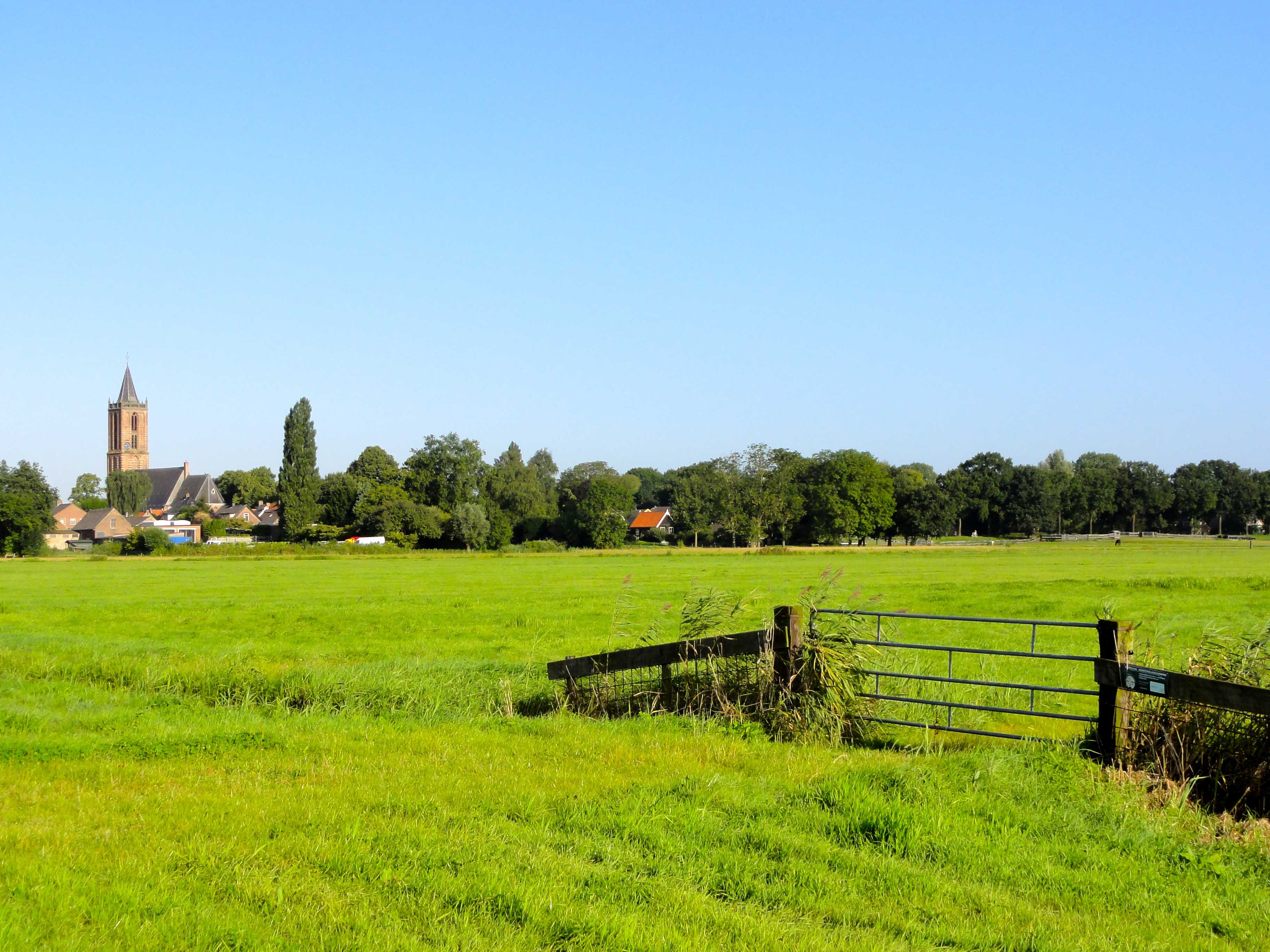 Nicolaaskerk Eemnes